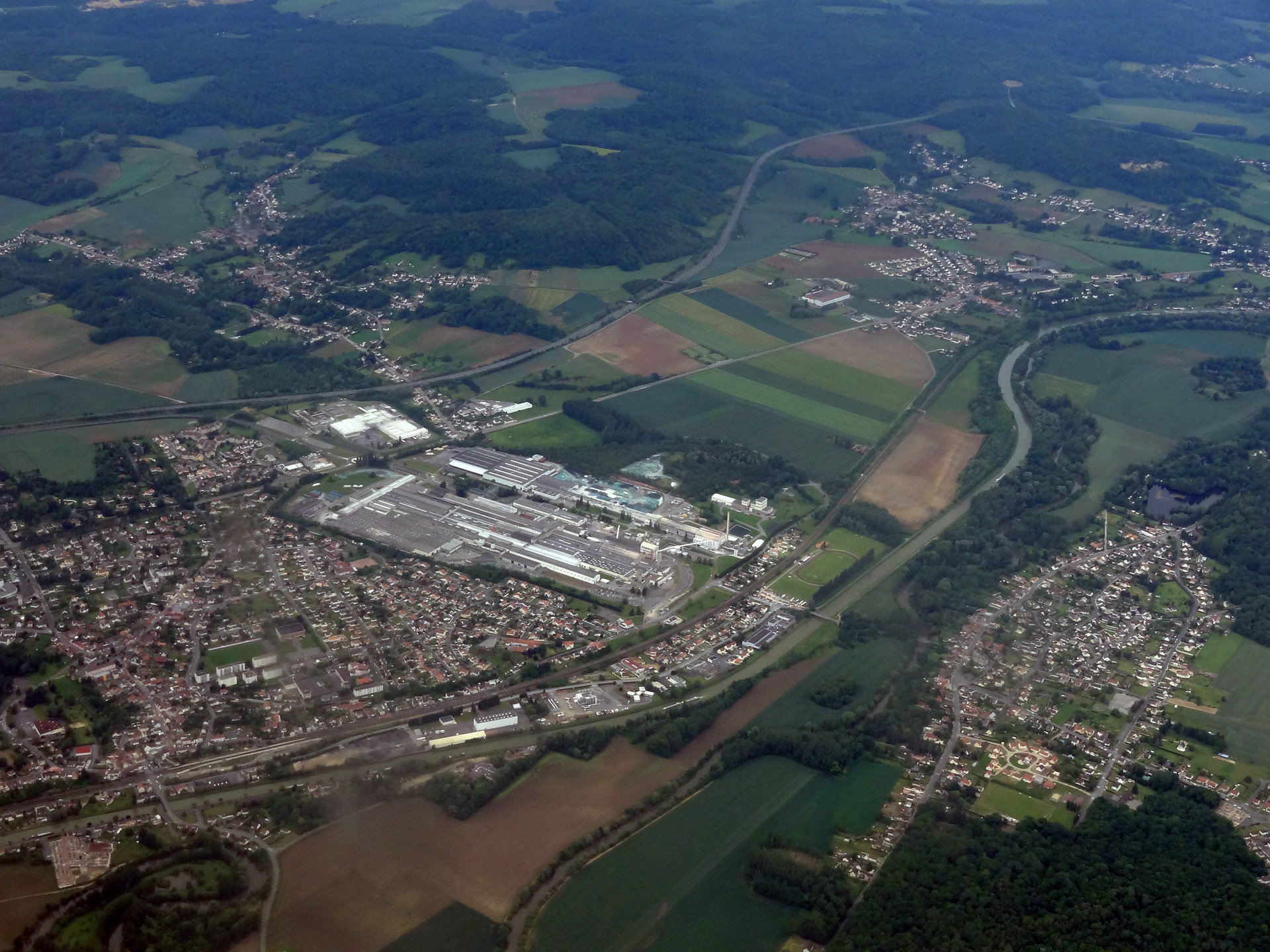 Vue aérienne de Montmacq (Oise), France.